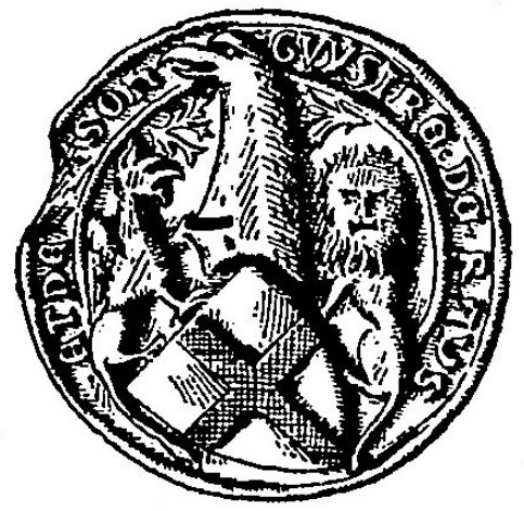 Sceau de Guy II de Laval-Retz, vers 1405-1407. Gravure parue dans Arthur Bertrand de Broussillon (éd.), La maison de Laval, 1020-1605. Étude historique accompagnée du cartulaire de Laval et de Vitré, tome II : Les Montmorency-Laval, 1264-1412, Paris, Alphonse Picard et Fils, 1898, p. 110.